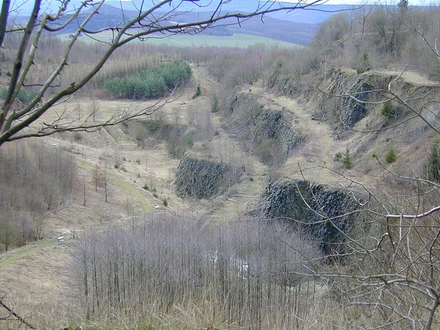 Basaltbruch Hoher Hagen (Südniedersachsen) im Januar 2007